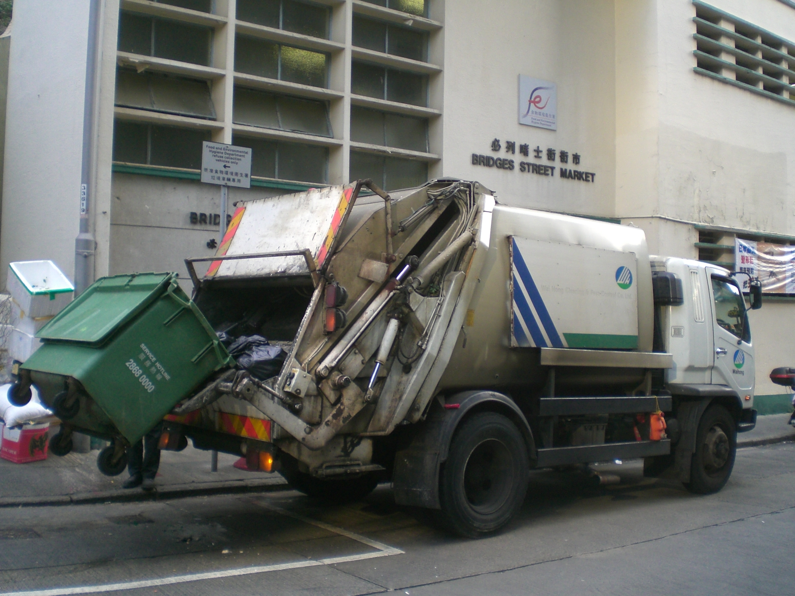 上環必列者士街垃圾站, 垃圾車 & 必列者士街街市